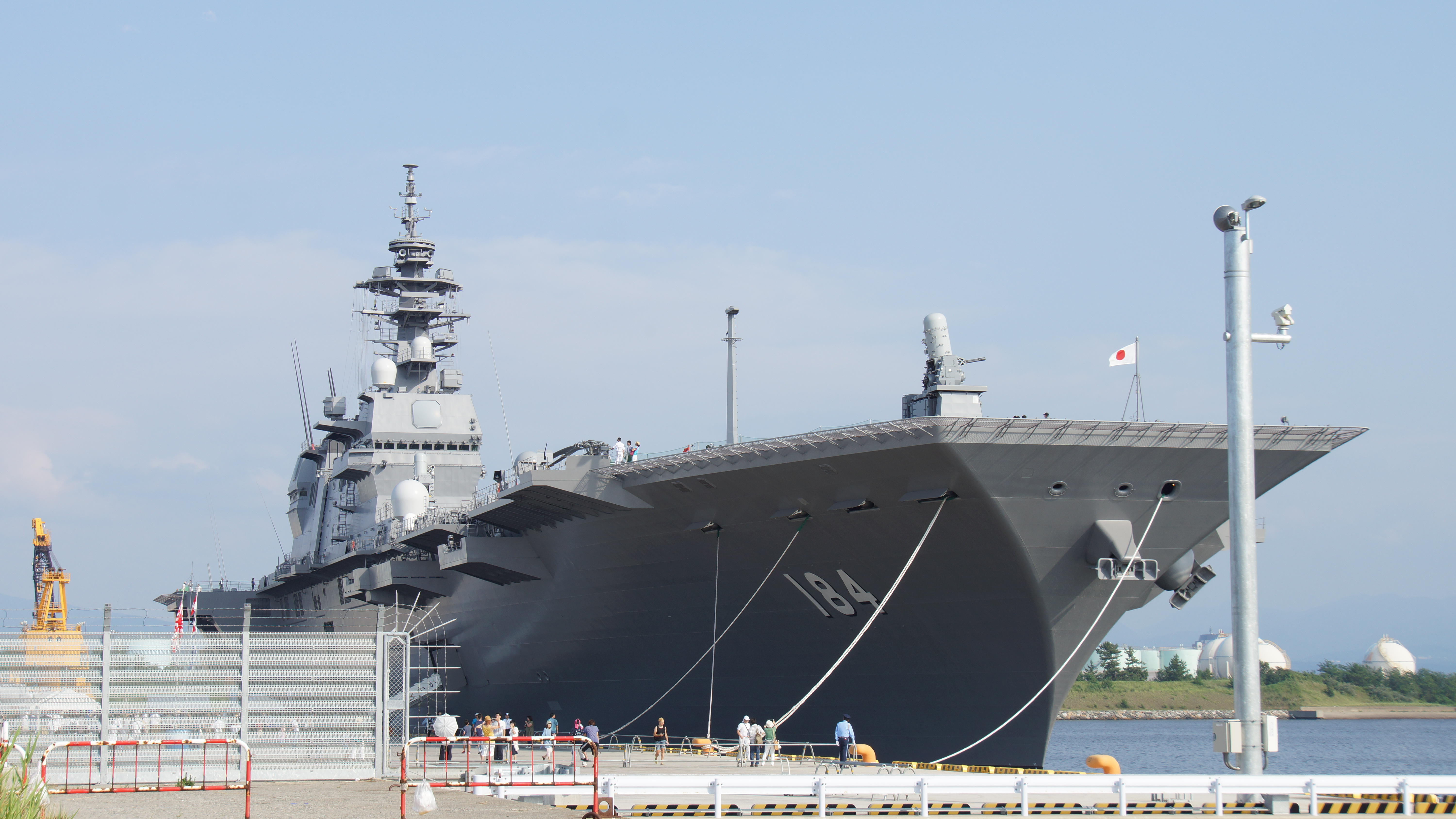 海上自衛隊 ヘリコプター搭載護衛艦かが（DDH-184） 右舷前面。2017年7月15日 金沢港にて。